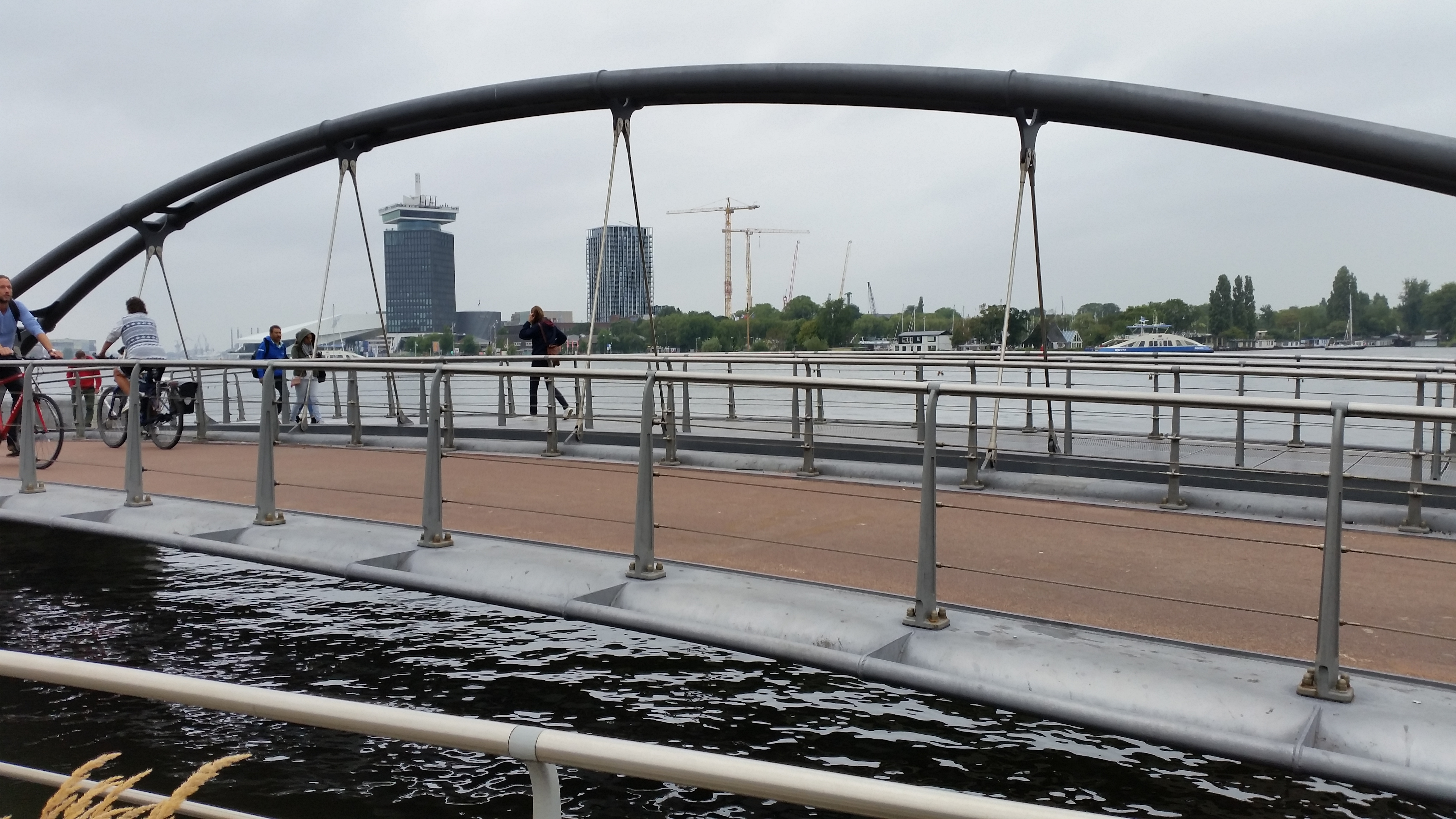 Brug 2274 (in Amsterdam); de overspanning met boog